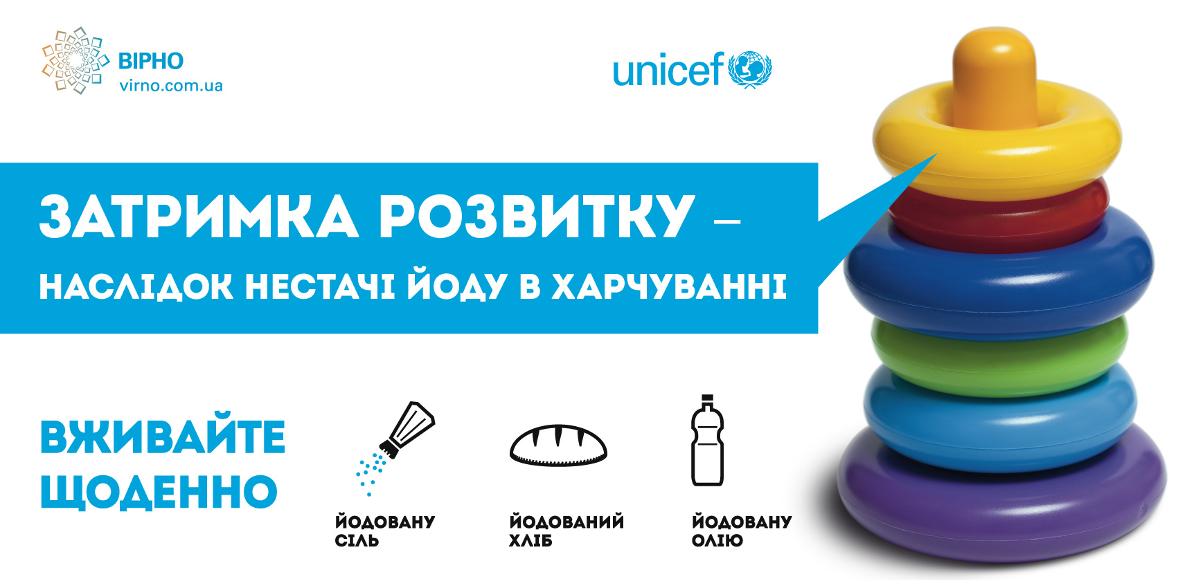 соціальна реклама в підтримку йодизації солі